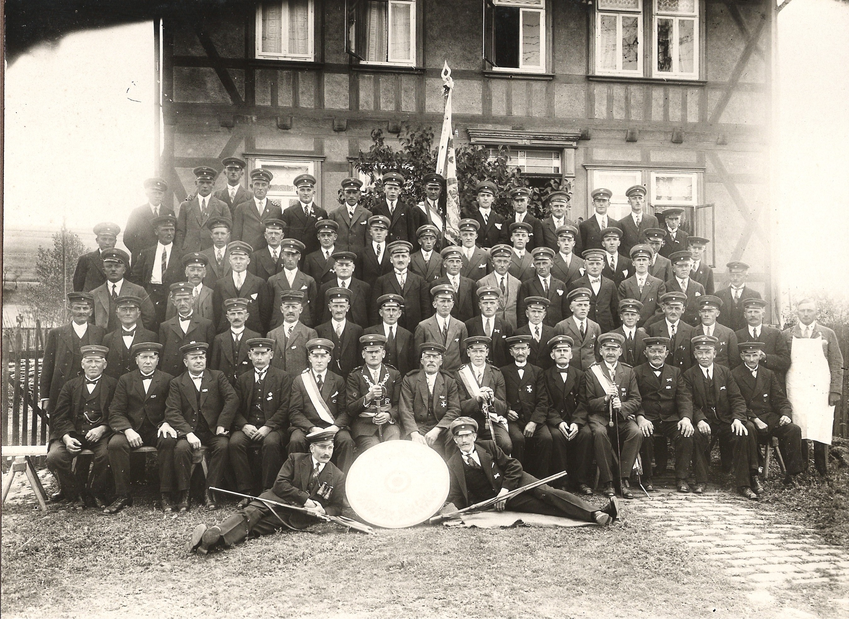 Schützenverein